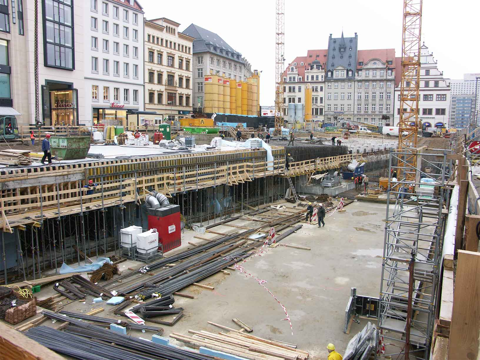 Baustelle Citytunnel Leipzig, Haltestelle Markt Fundamentarbeiten; 02-2006